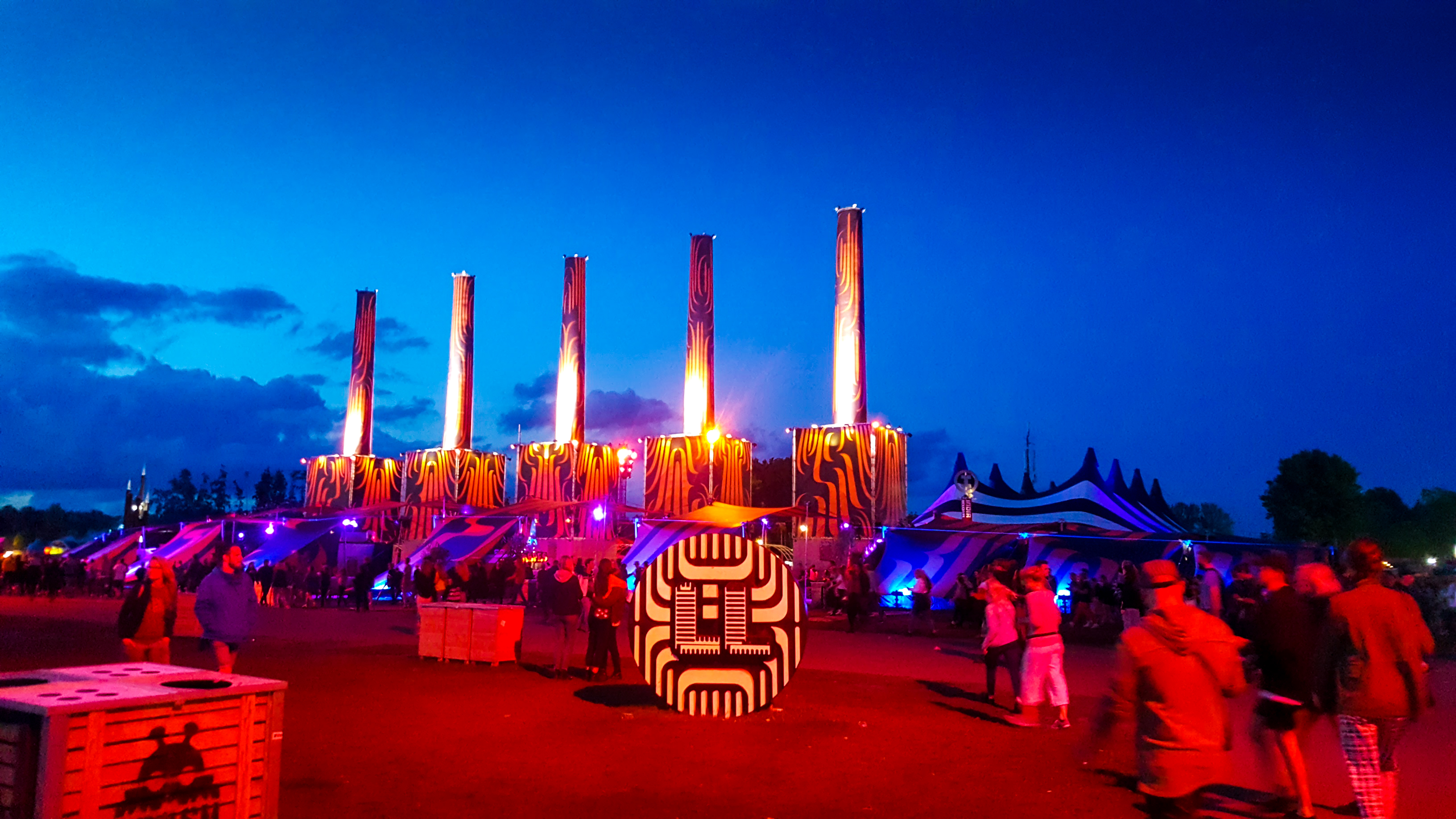 De kenmerkende schoorstenen van Lowlands 2019 in het gebied Cape Lowlands dat 24 uur per dag toegankelijk was tijdens het festivalweekend